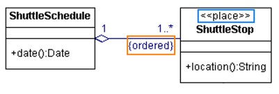 Exemple d'estereotips UML